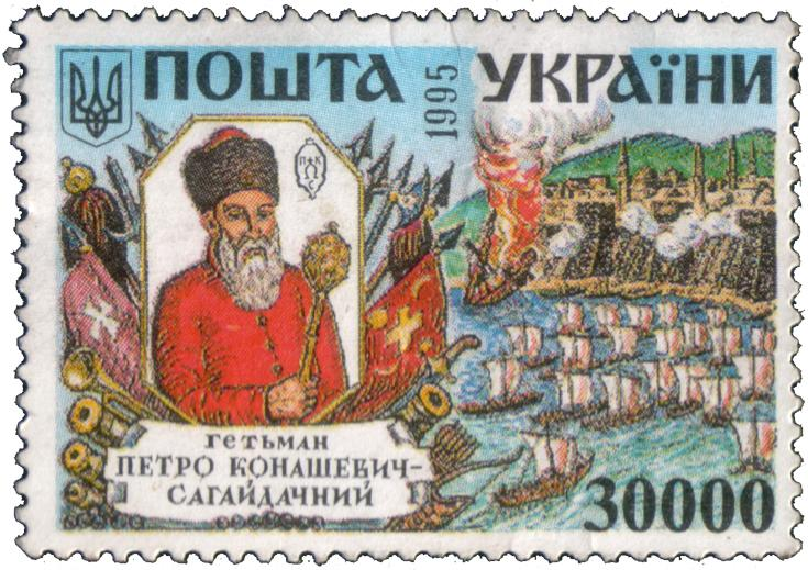 Марка Сагайдачний